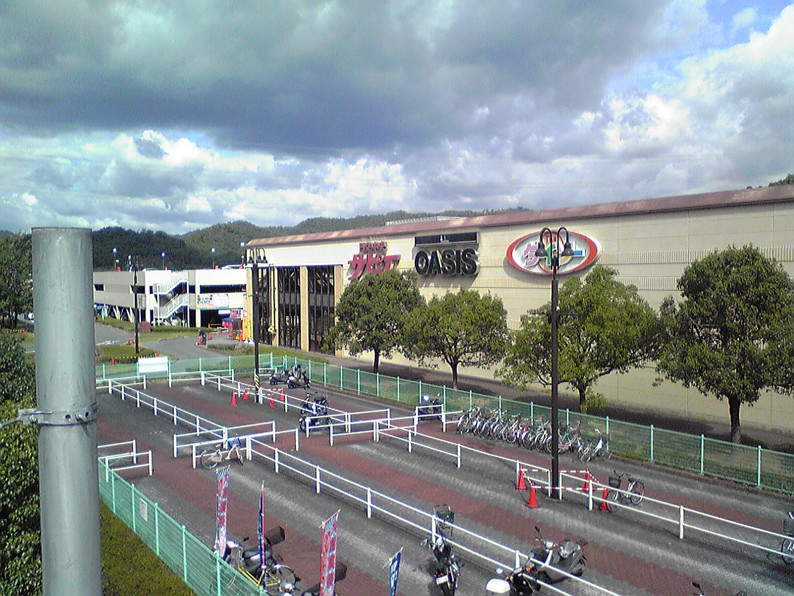 日生中央サピエ